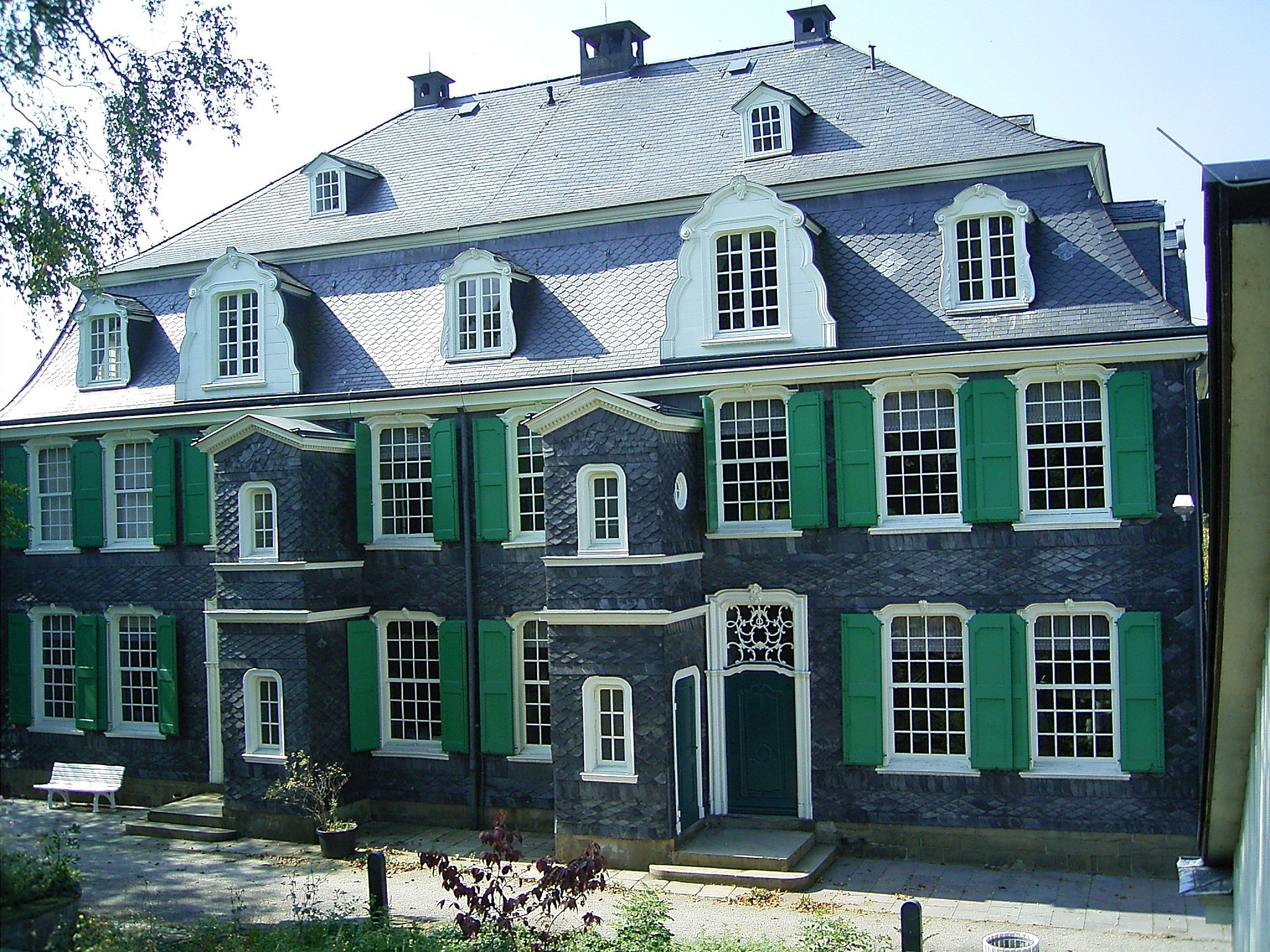 Haus Cleff: Heimatmuseum und Historisches Zentrum in Remscheid / Remscheid town museum